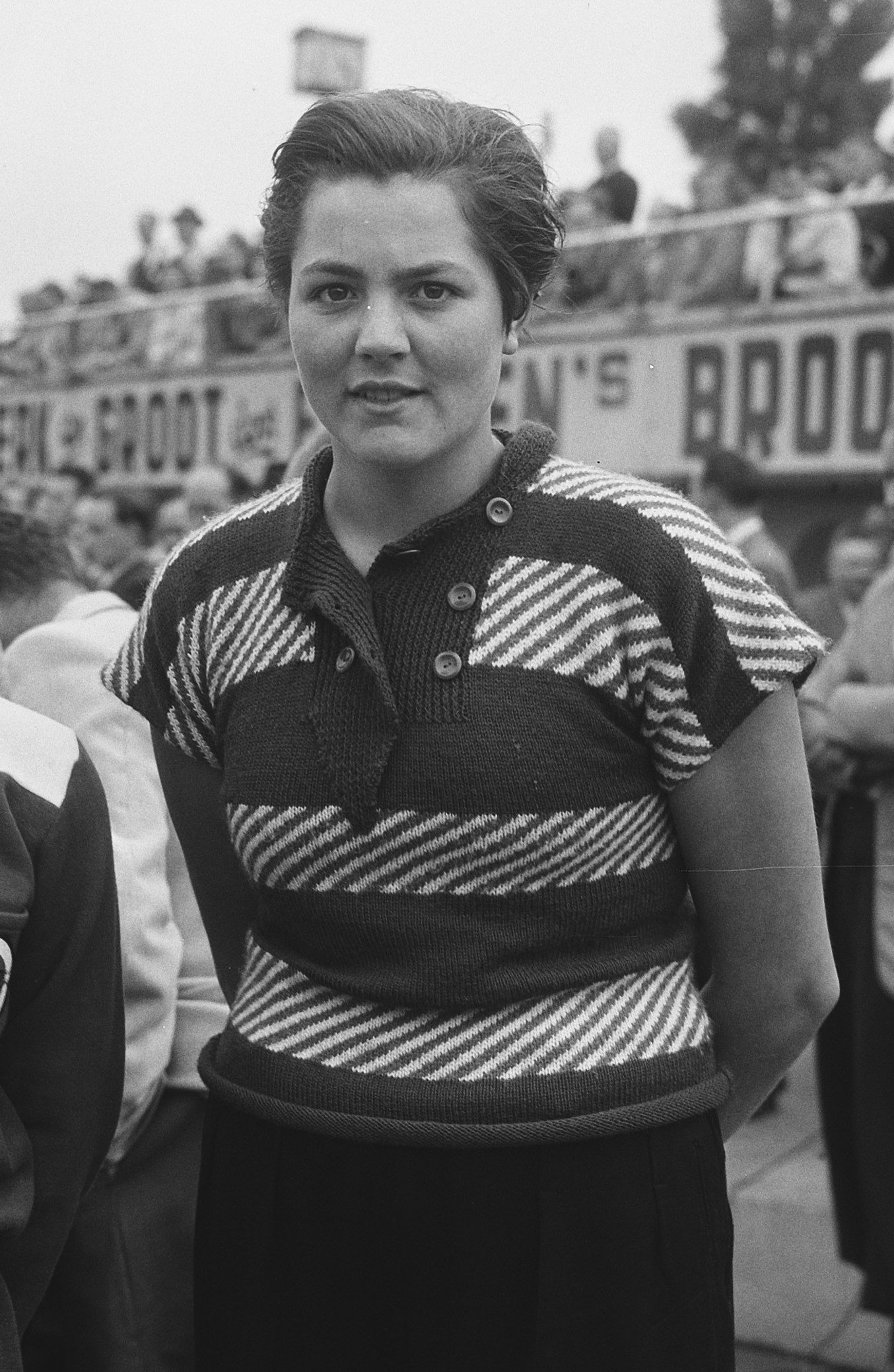 Collectie / Archief : Fotocollectie Anefo Reportage / Serie : Sportkoppen Zwemmen Beschrijving : Ria van der Horst en Rineke Symons (rechts) Datum : 15 juni 1952 Trefwoorden : sport, zwemmen Persoonsnaam : Horst, Ria van der, Symons, Rineke Fotograaf : Pot, Harry / Anefo, [onbekend] Auteursrechthebbende : Nationaal Archief Materiaalsoort : Glasnegatief Nummer archiefinventaris : bekijk toegang 2.24.01.09 Bestanddeelnummer : 905-1648